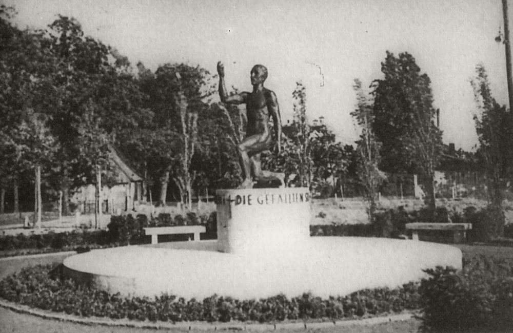 Nordhorn